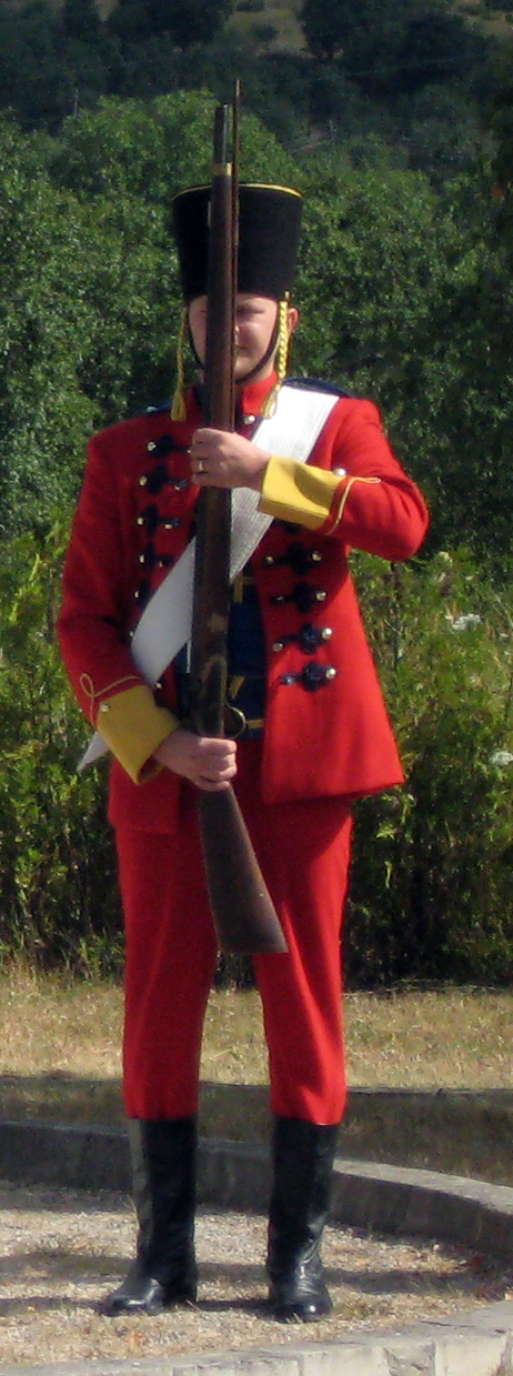 Replika "Otočkih graničara", Otočke pukovnije (postojala je do ukidanja Vojne granice 1871. godine) koja je tada obuhvaćala Gacku i sjevernu polovicu Krbave, sve do turske granice prema Bosni. Sjedište pukovnije i stan pukovnika bio je u gradu Otočcu.